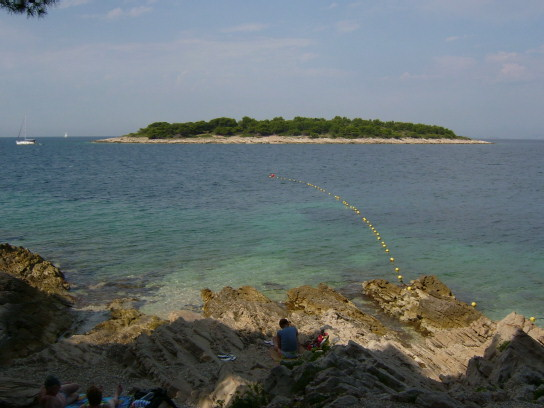 Vidaĵo al Smokvica La insuleto "Smokvica" vidata de la antaŭa E-feriejo ĉe Primoŝten (memfarita foto, libere uzebla)